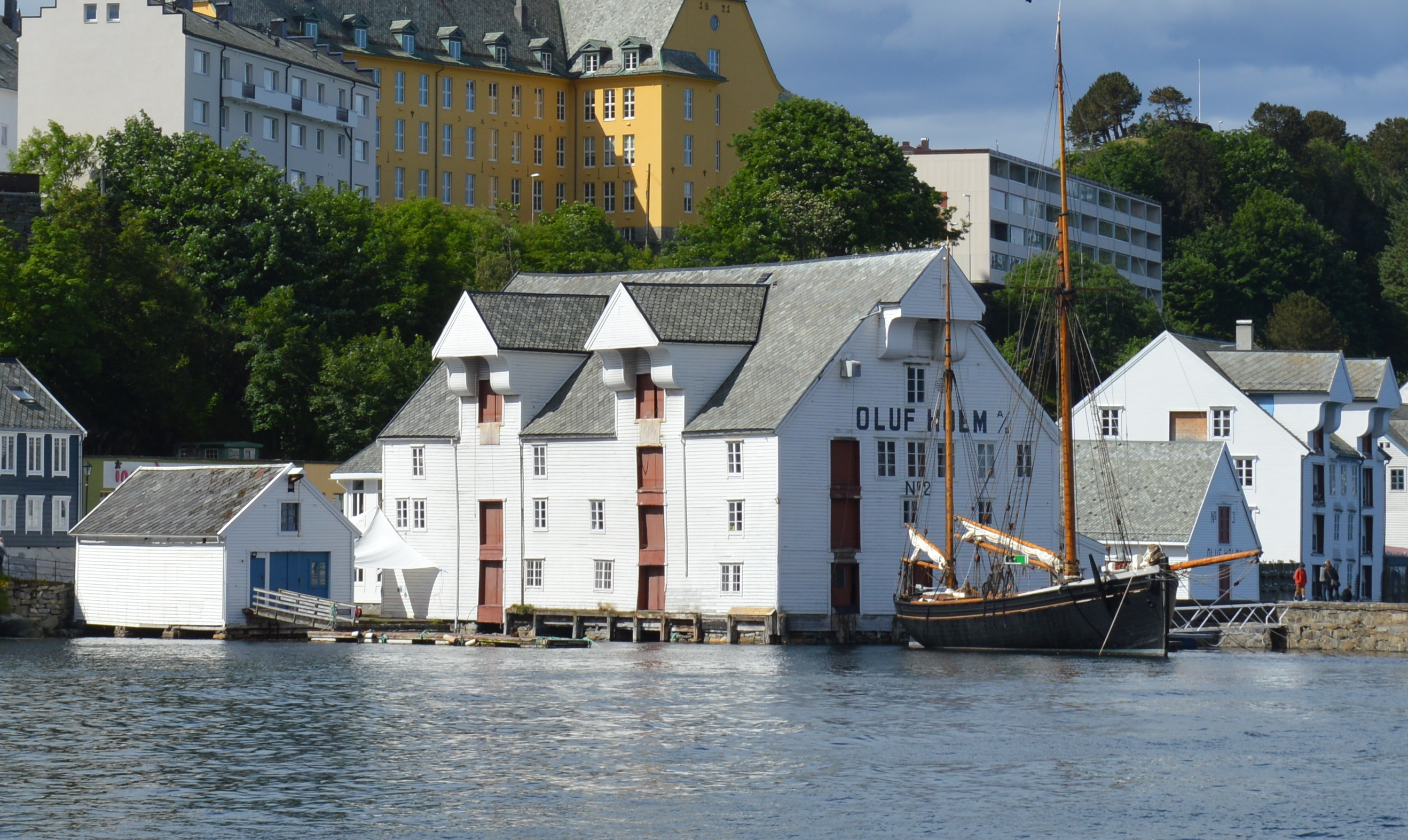 Fischereimuseum Alesund